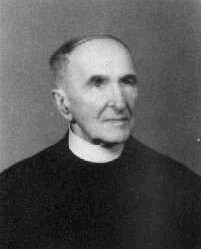 Jindřich Langner (1870 - 1956), Český katolický vlastenecký kněz.